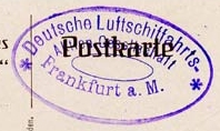 DELAG-Ovalstempel.jpg Sonstiges: ...